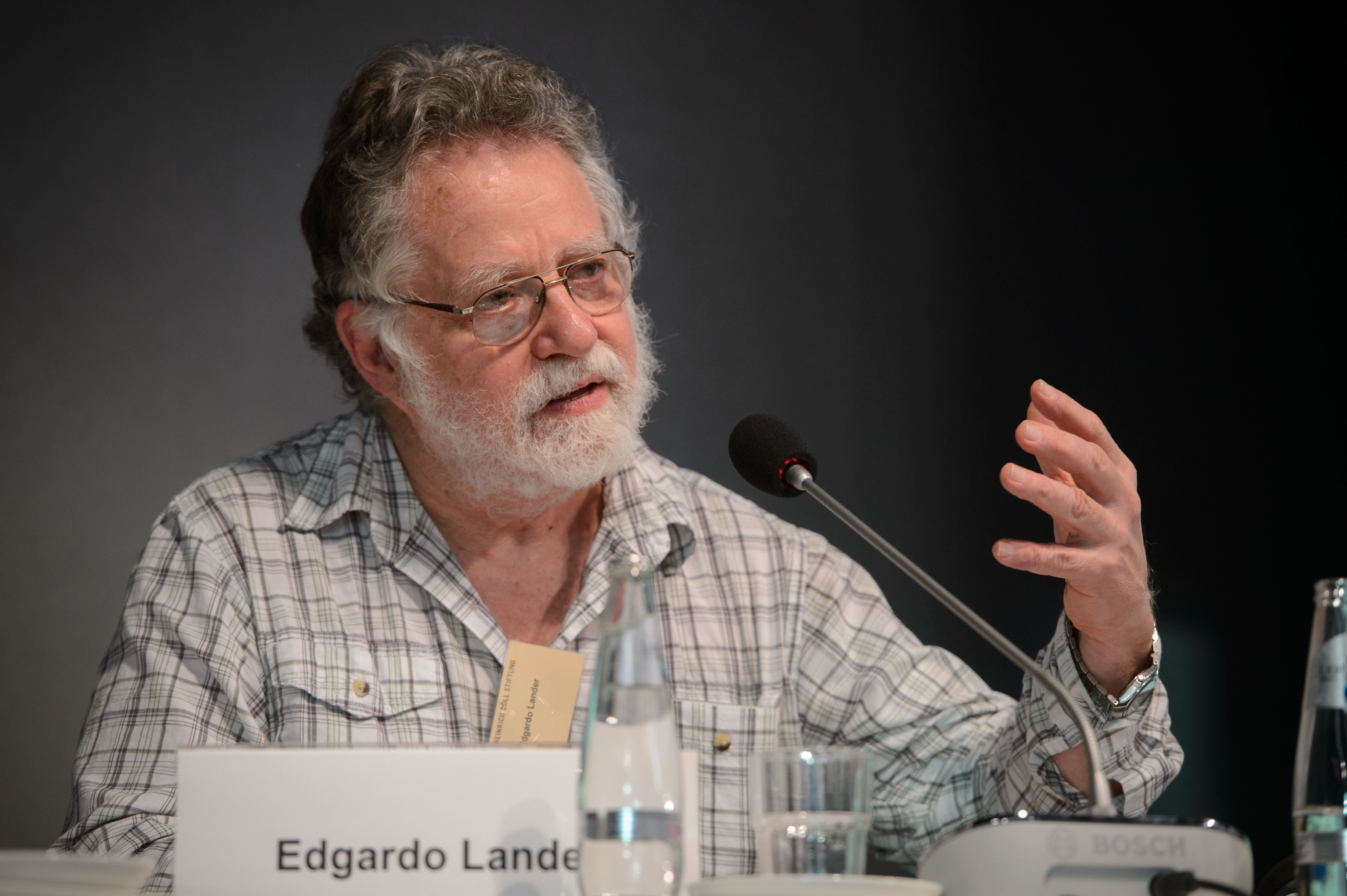 Edgardo Lander (Universidad Central de Venezuela, Caracas), Foto